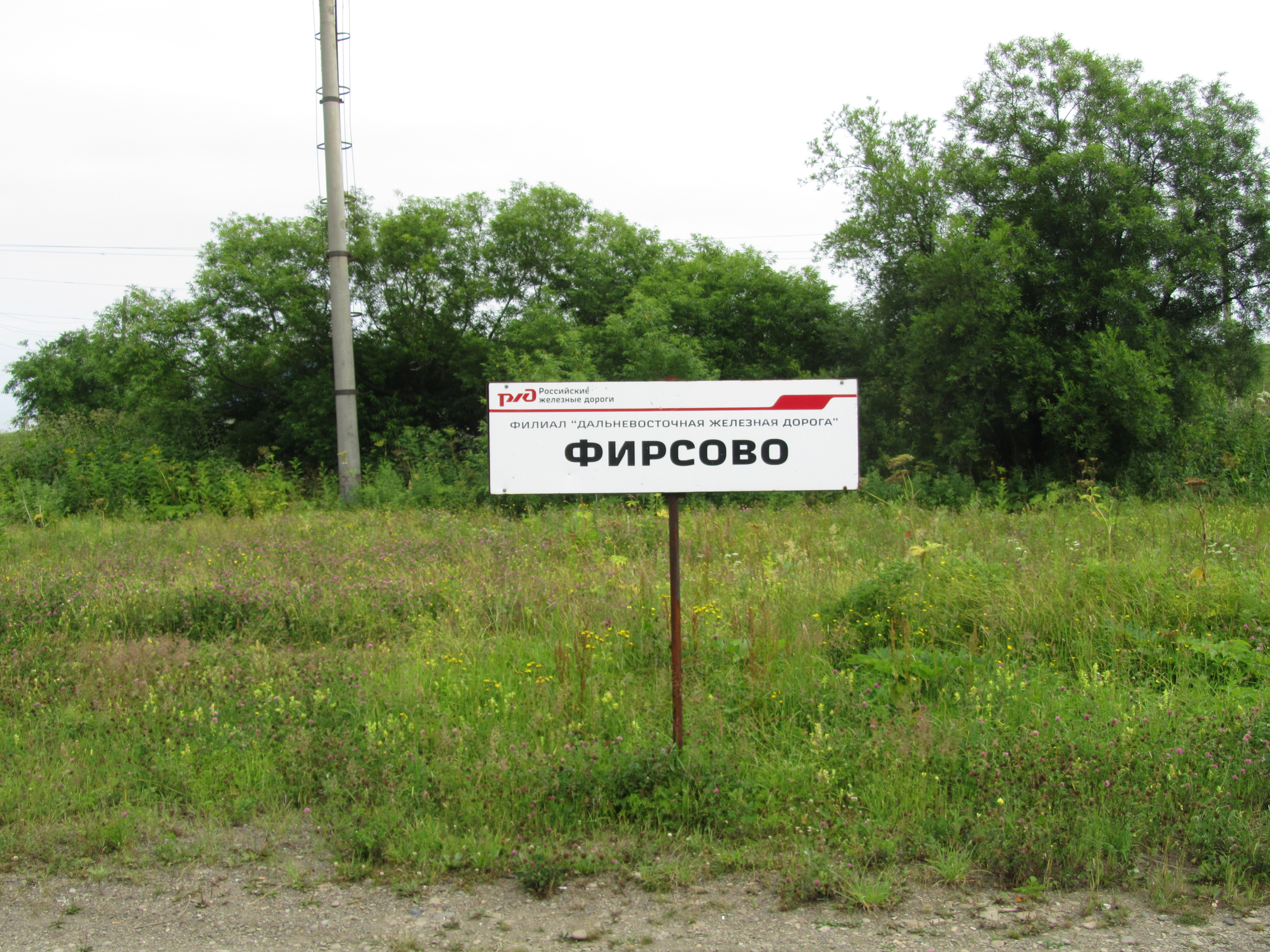 Станция Фирсово Сахалинского региона ДВЖД